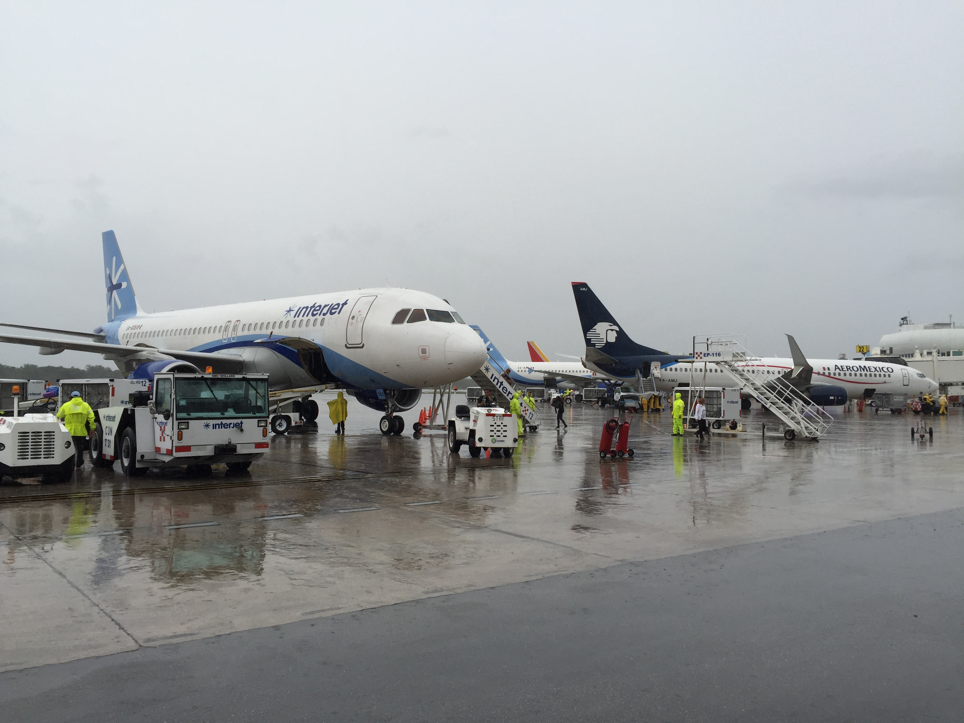 Aviones en el Aeropuerto Internacional de Cancún.